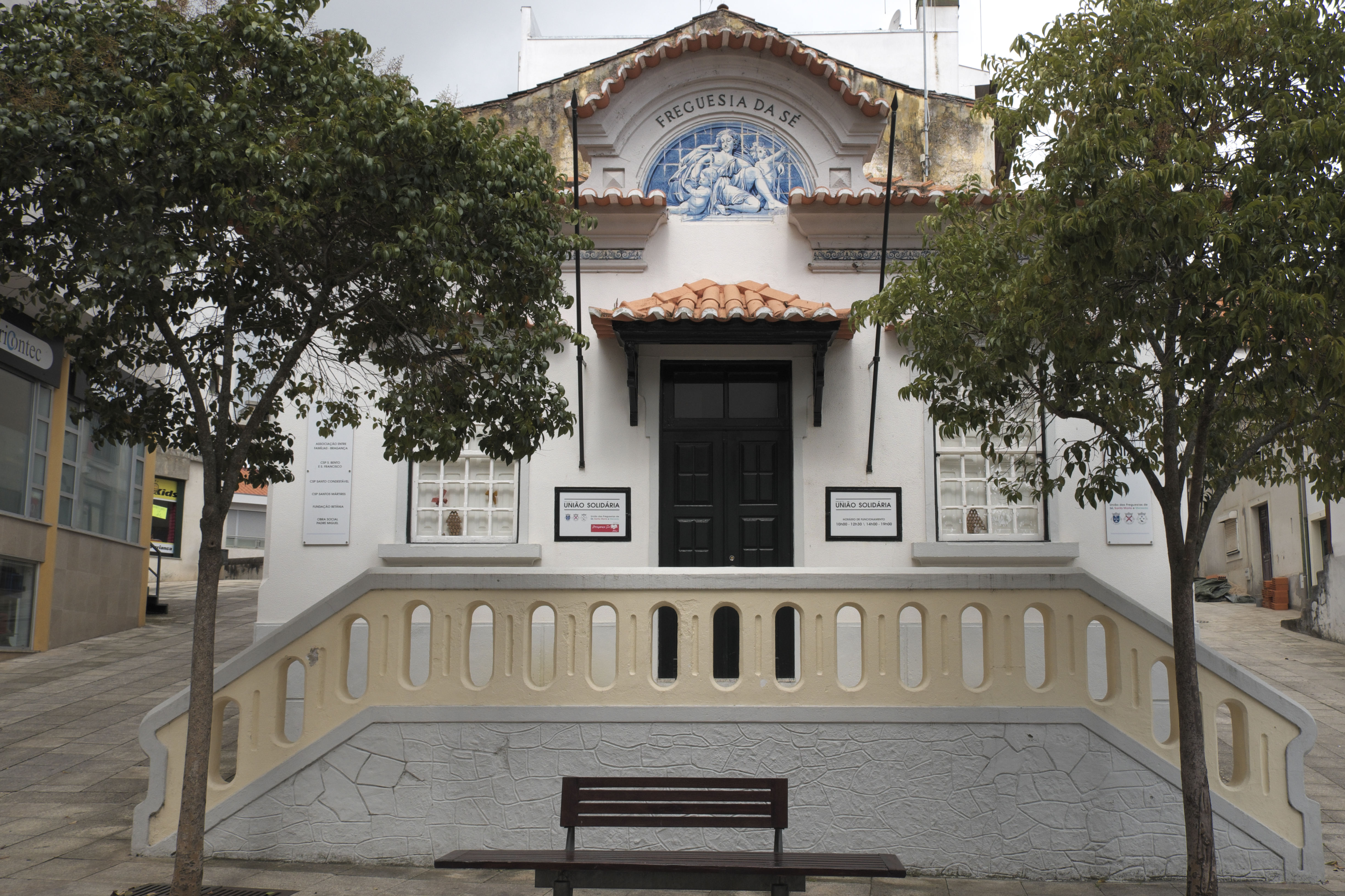 Junta (Gemeindeverwaltung) von Sé, heute Sé, Santa Maria e Meixedo, in Bragança in Nordportugal